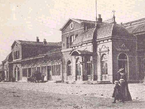 oude prent van het Weesperpoortstation wegens ouderdom PD